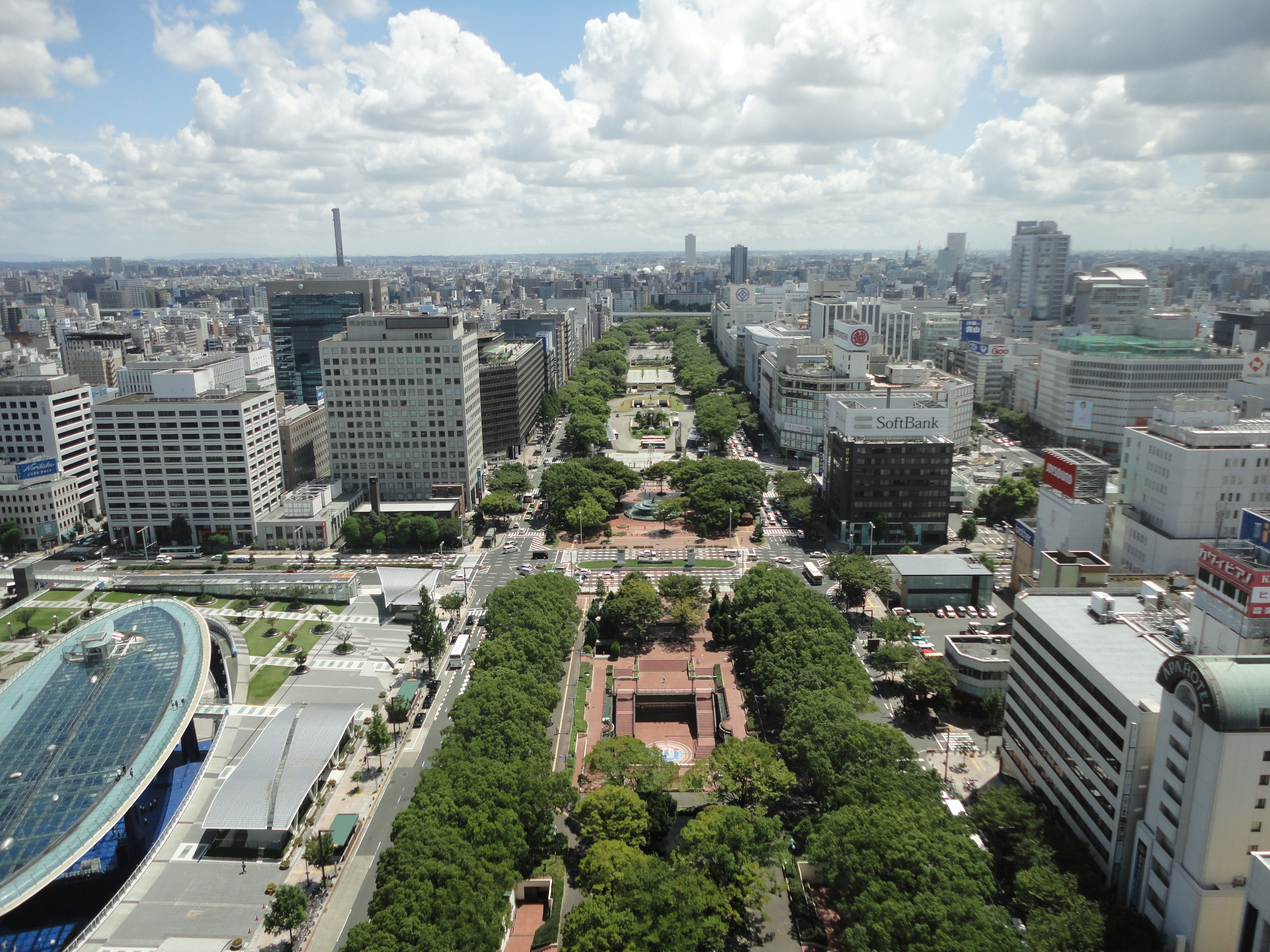 名古屋テレビ塔